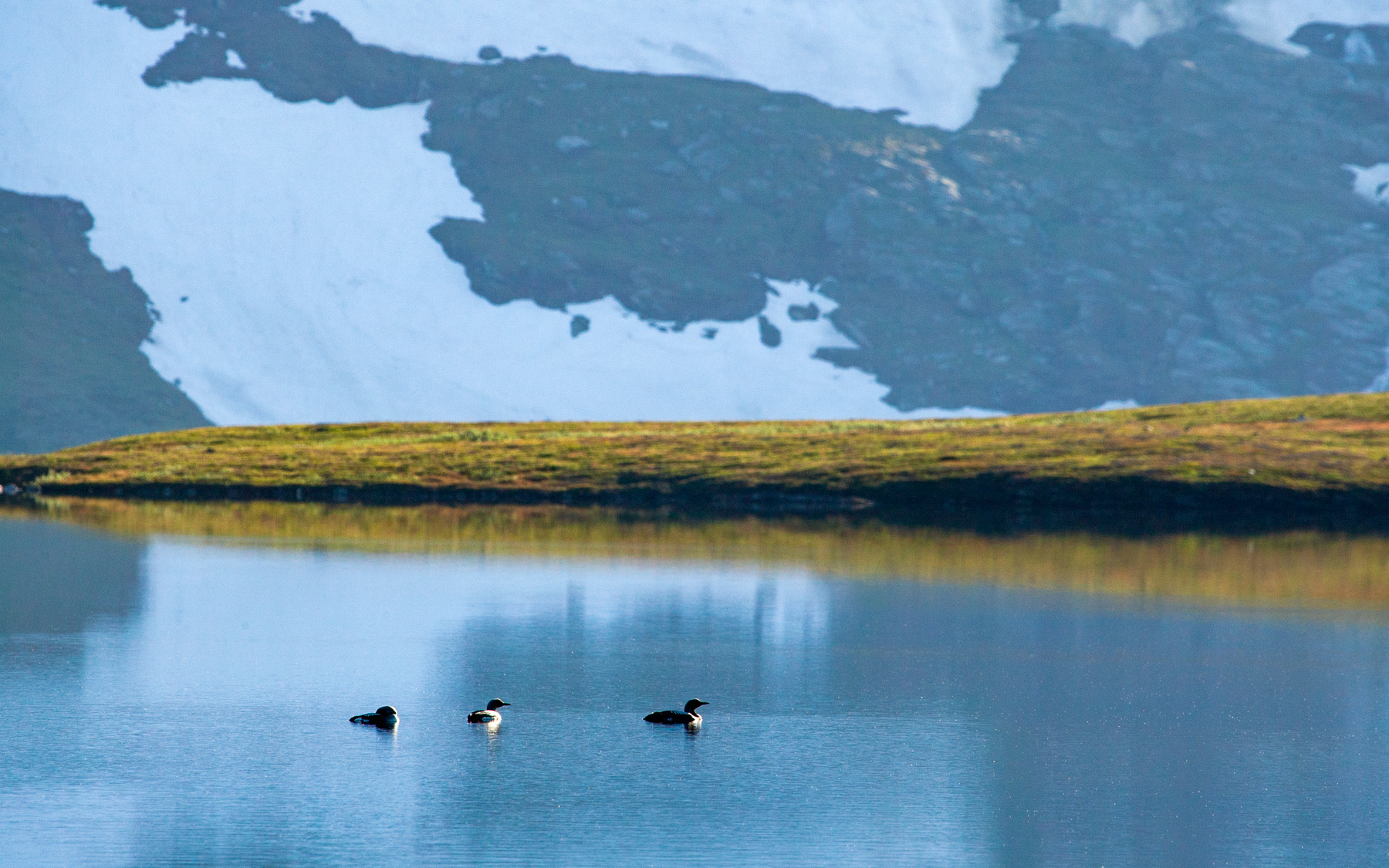 Storlom i Ieltijávrásj.